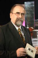 Fotografia Jana Poprawy.